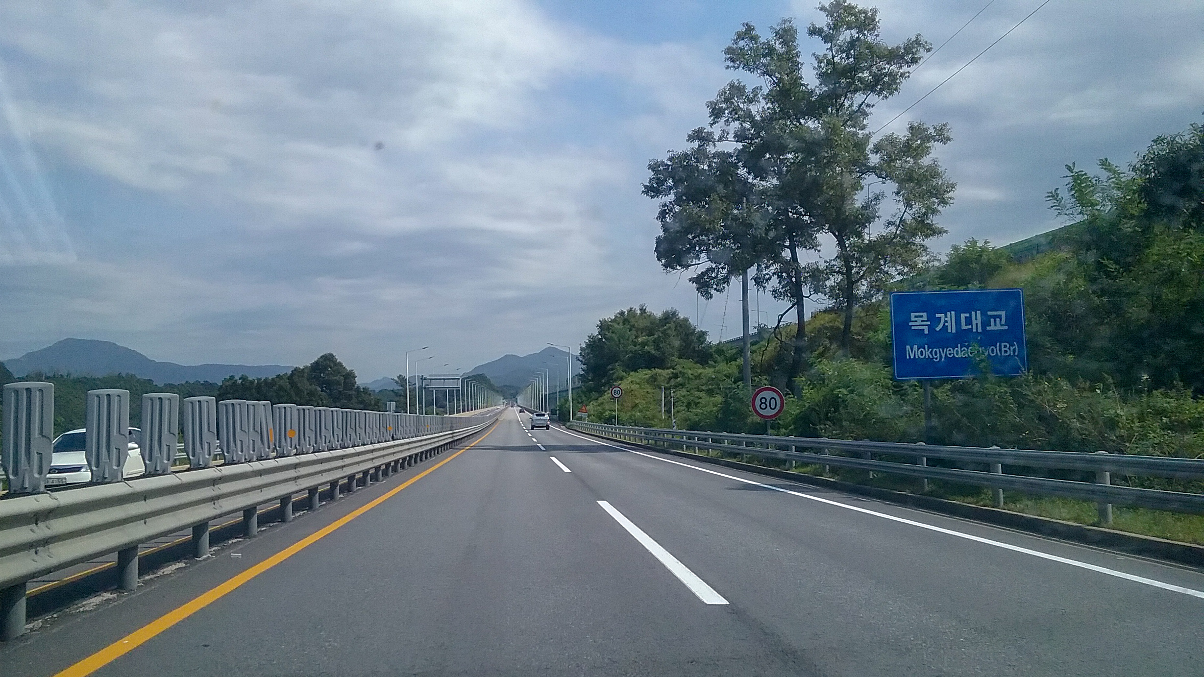 국도 제38호선 북부로 목계대교 제천 방면 표지판